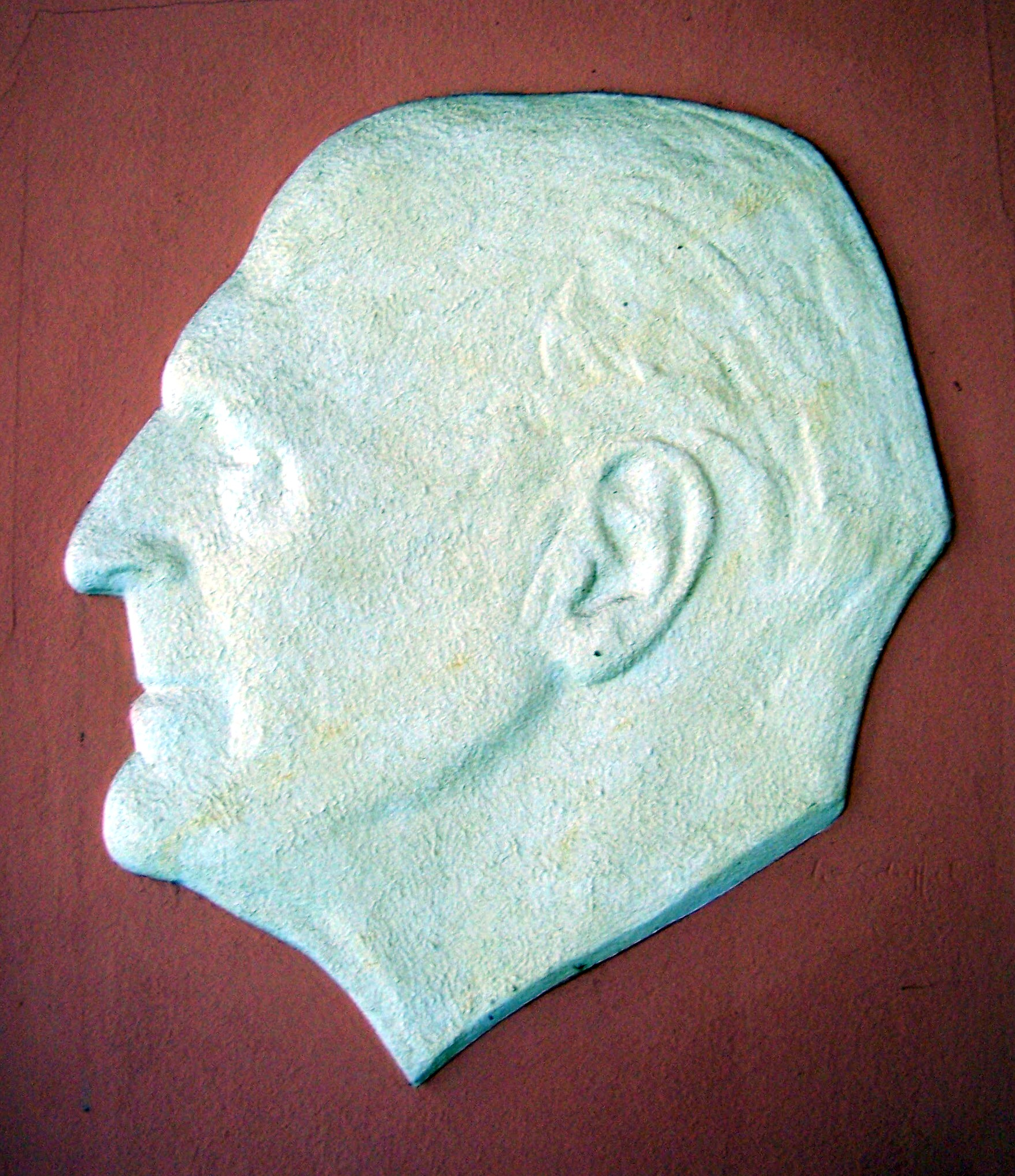 Portraitrelief von Friedrich Wilhelm Neuffer an der Fassade des Neuffer-Baus der TU Dresden